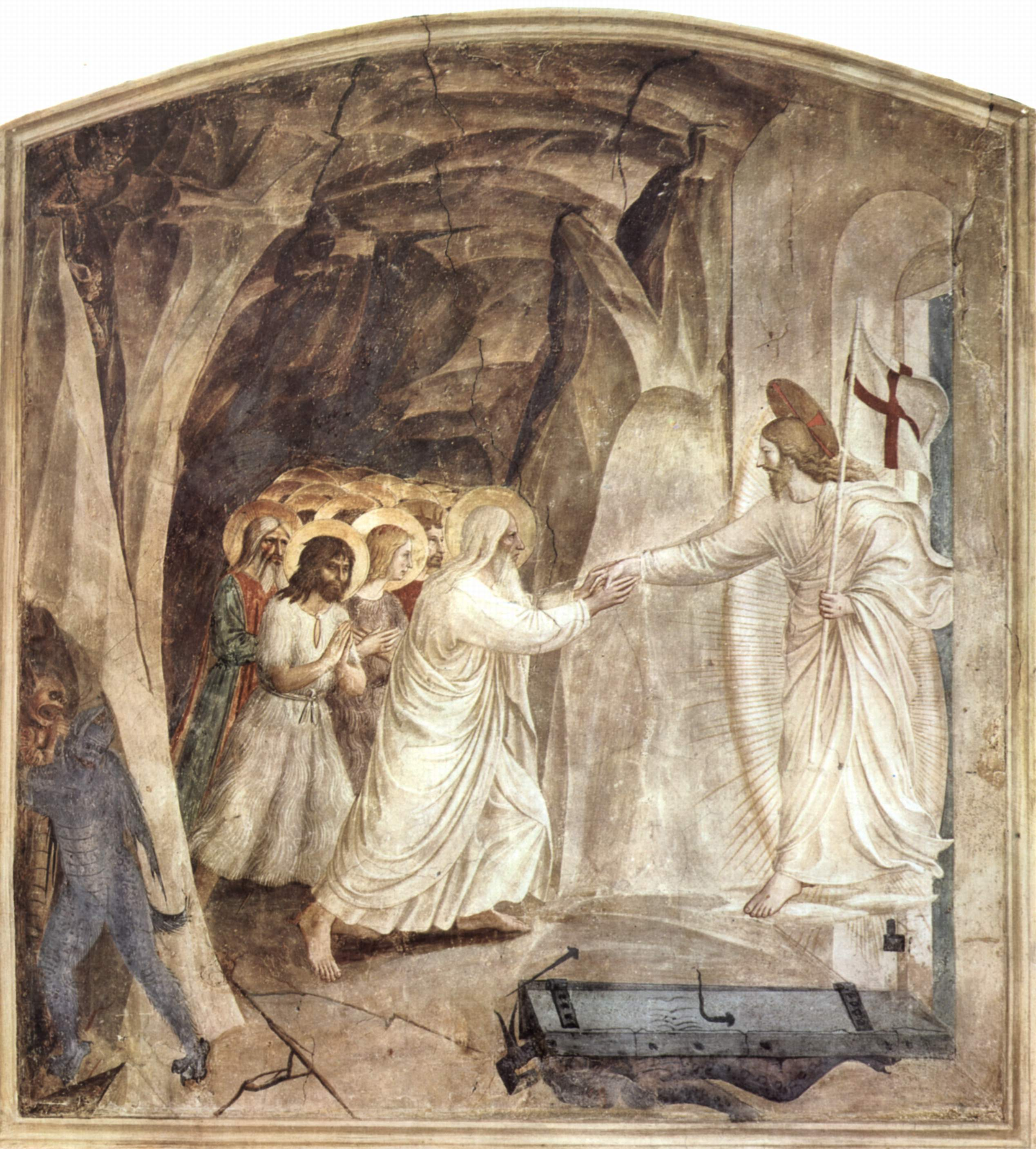 Freskenzyklus im Dominikanerkloster San Marco in Florenz, Szene: Höllenfahrt Christi, Erlösung alttestamentarischer Personen (Adam)